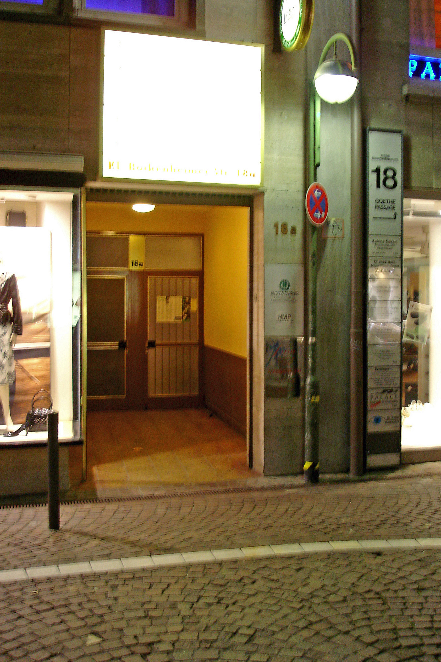 Jazzkeller, Eingang, Frankfurt am Main, Kleine Bockenheimer Straße (geöffnet)